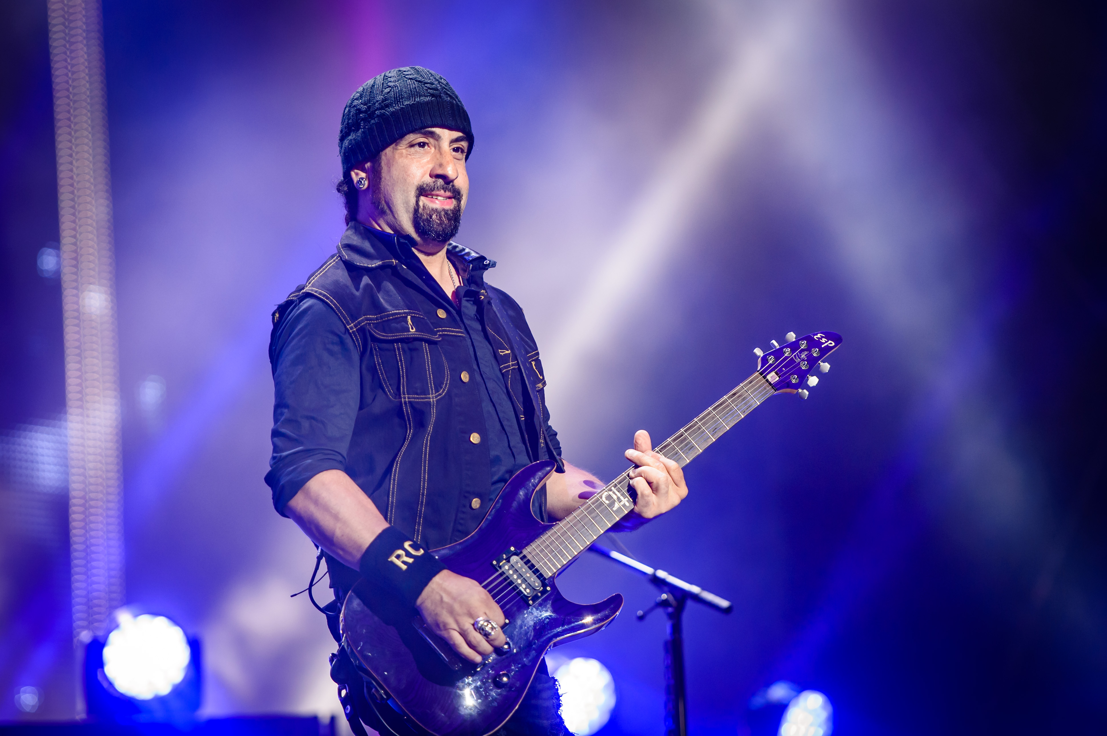 'Wacken Open Air 2017; Wacken': 'Volbeat'